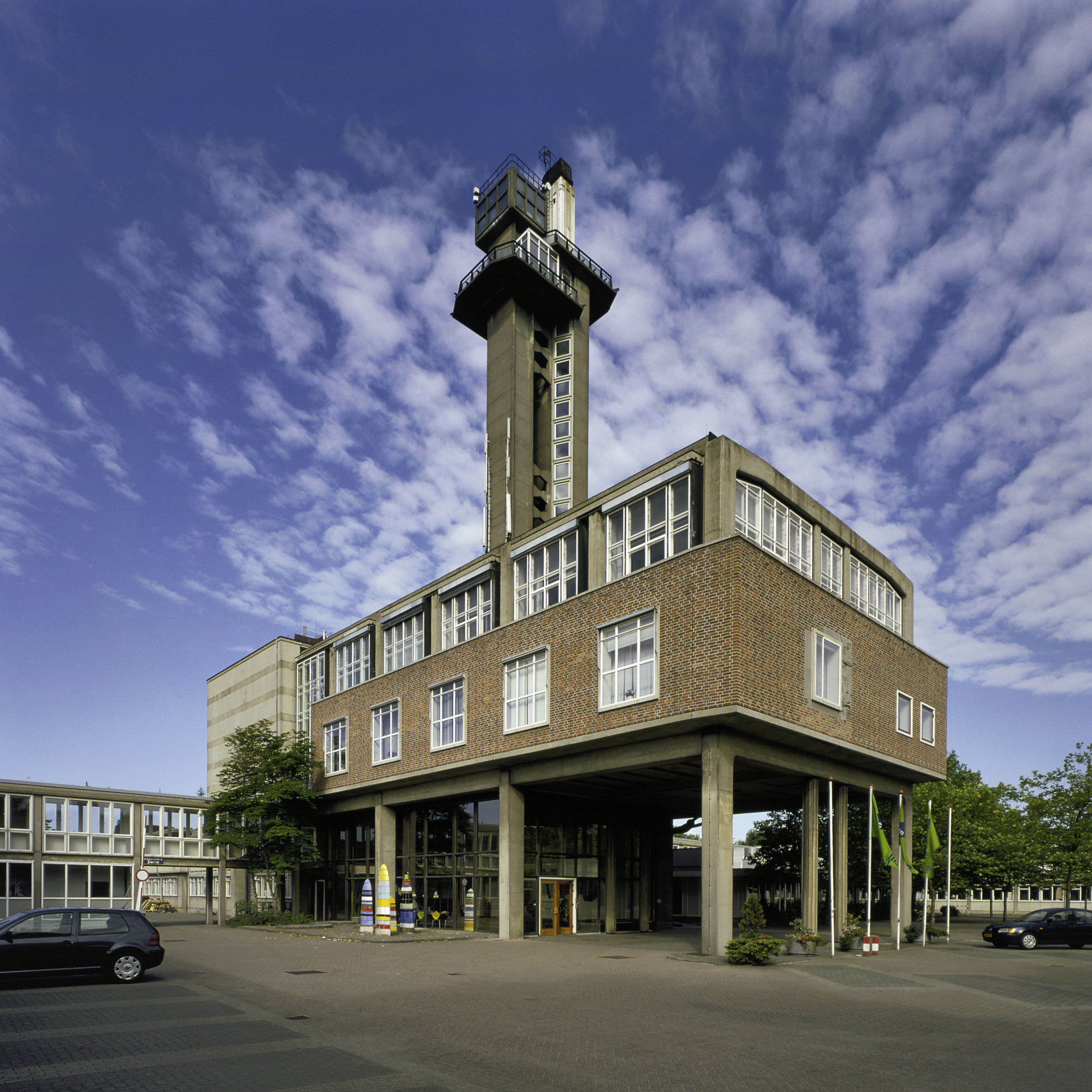 Dr. Neher Laboratorium: Overzicht van de middenvleugel met de vijftig meter hoge toren (opmerking: Gefotografeerd voor Monumenten van Herrezen Nederland, bladzijde 69)